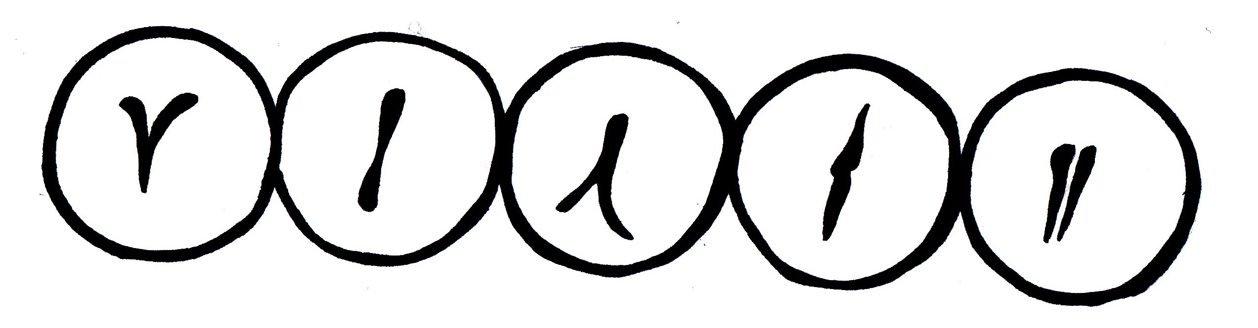 Els siamesos